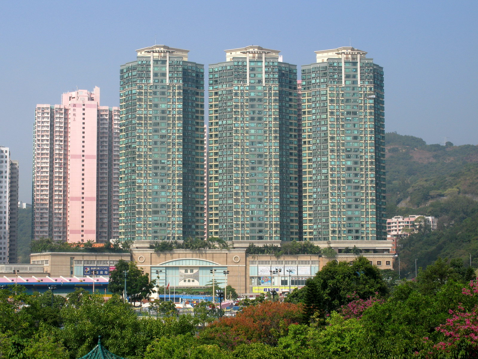 盈暉臺 (荔園舊址) Nob Hill, former Lai Chi Kok Amusement Park